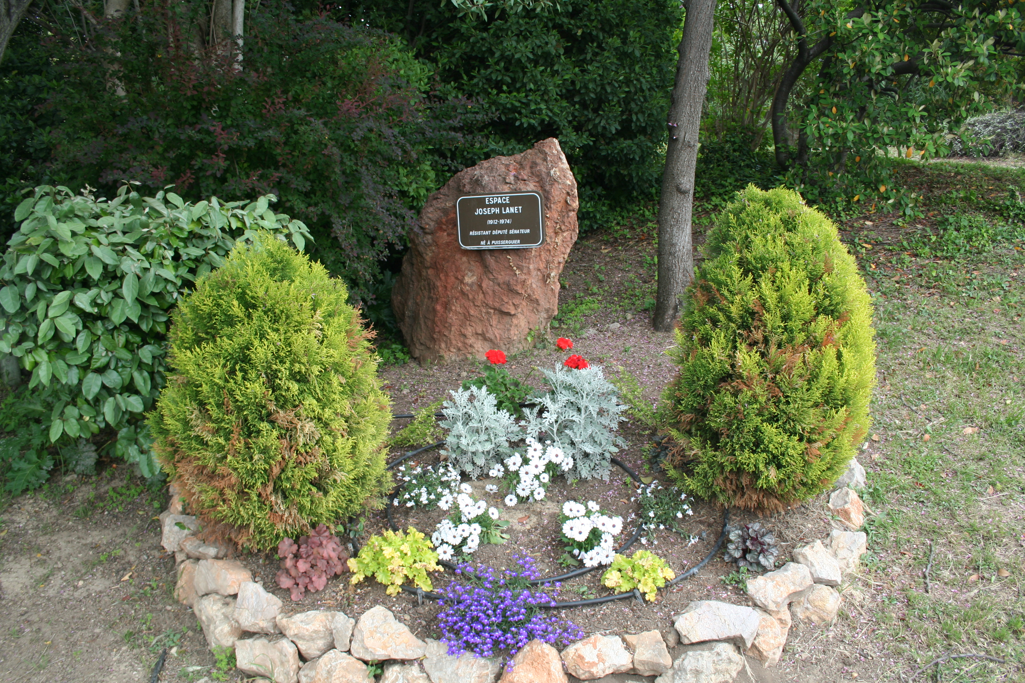 Puisserguier (Hérault) - plaque Joseph Lanet (1912-1974), résistant, député, sénateur, né à Puisserguier